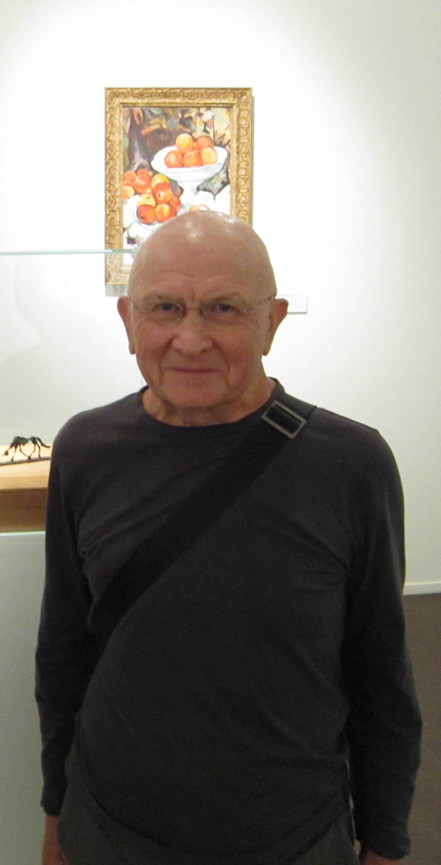 Фотография художника Леонида Сокова, сделанная на его выставке в Москве в 2012 году.